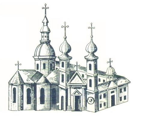 Беларуская (тарашкевіца): Будслаў (Budsłaŭ), пляц Красны (plac Krasny). Касьцёл Унебаўзяцьця Найсьвяцейшай Панны Марыі і кляштар бэрнардынаў